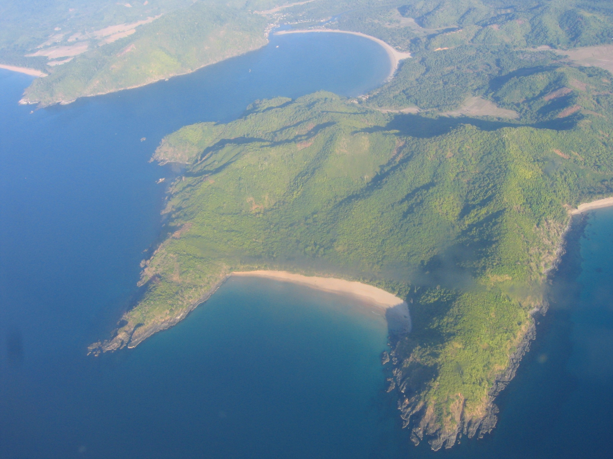 Barangay Bucana in the North part of El Nido municipality, Palawan, Philippines.